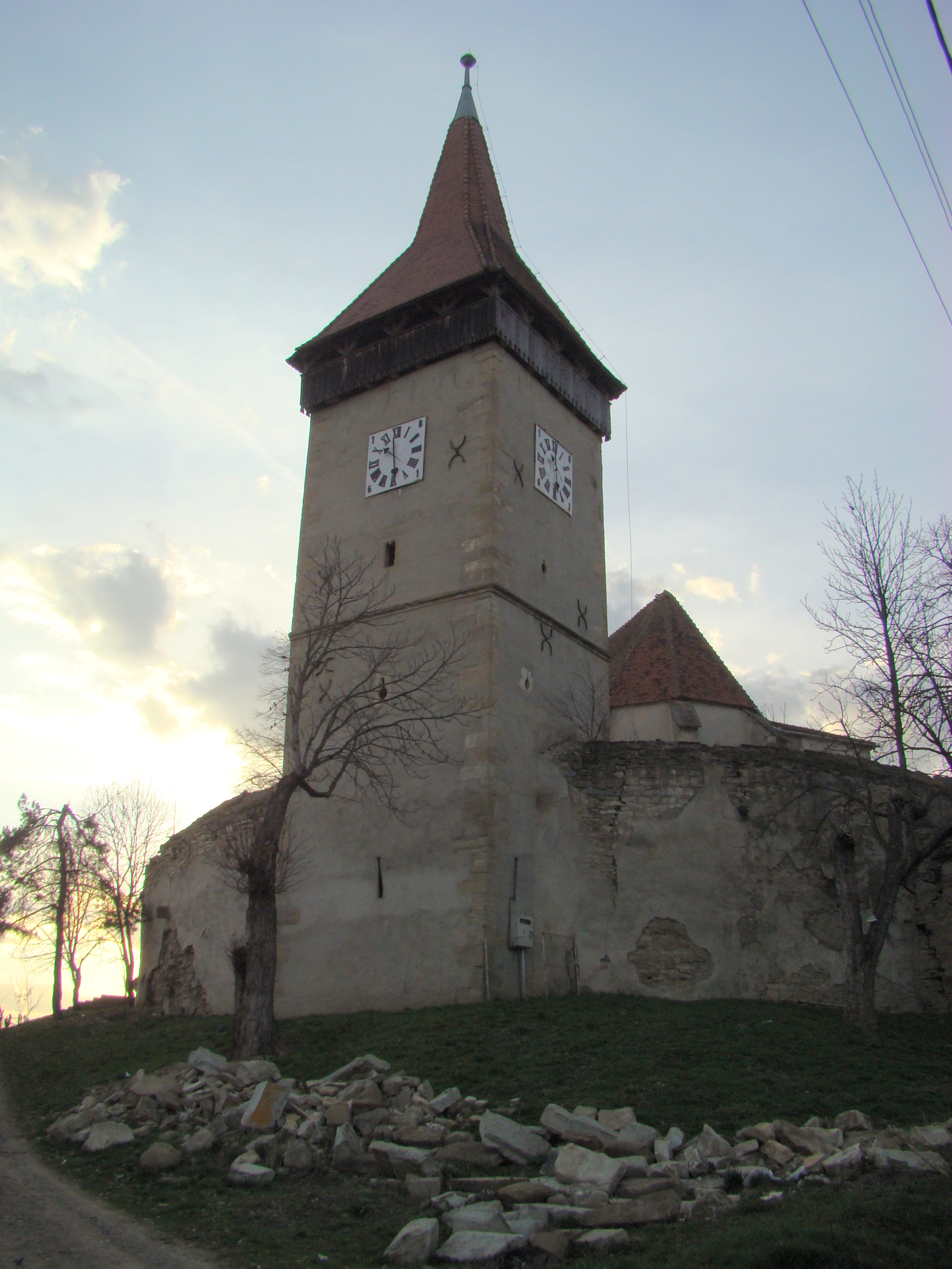 Biserica evanghelică, sat Lechința; comuna Lechința, județul Bistrița-Năsăud